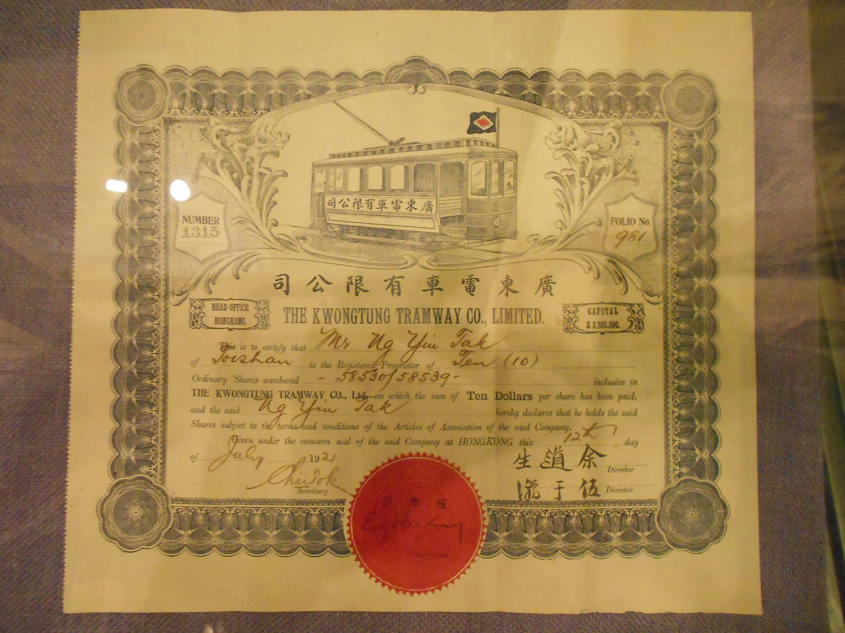 廣東電車有限公司（原廣州電車路公司）的股票，「廣東」的英文以粵音拼寫「Kwongtung」。